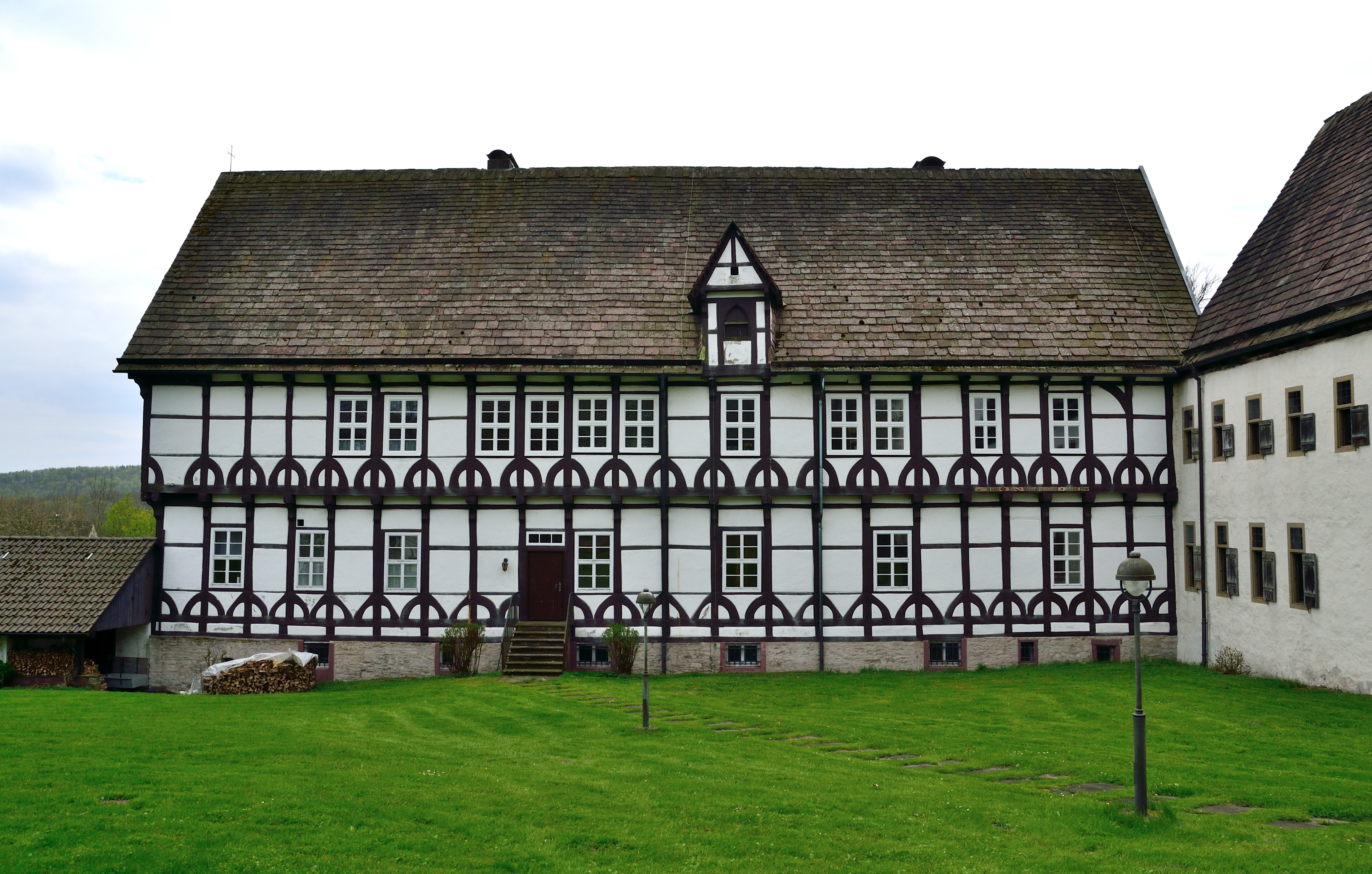 Pfarrhaus der evangelisch-reformierten Klosterkirche Falkenhagen, Nordseite